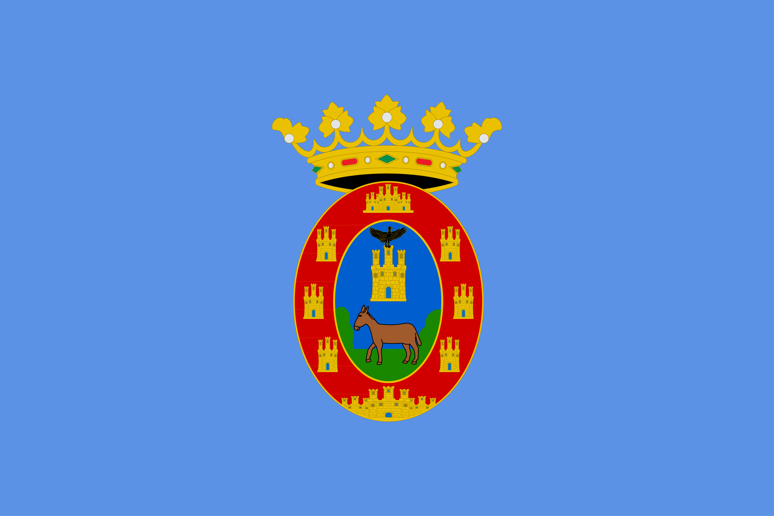 Bandera de Mula, en Murcia (España)